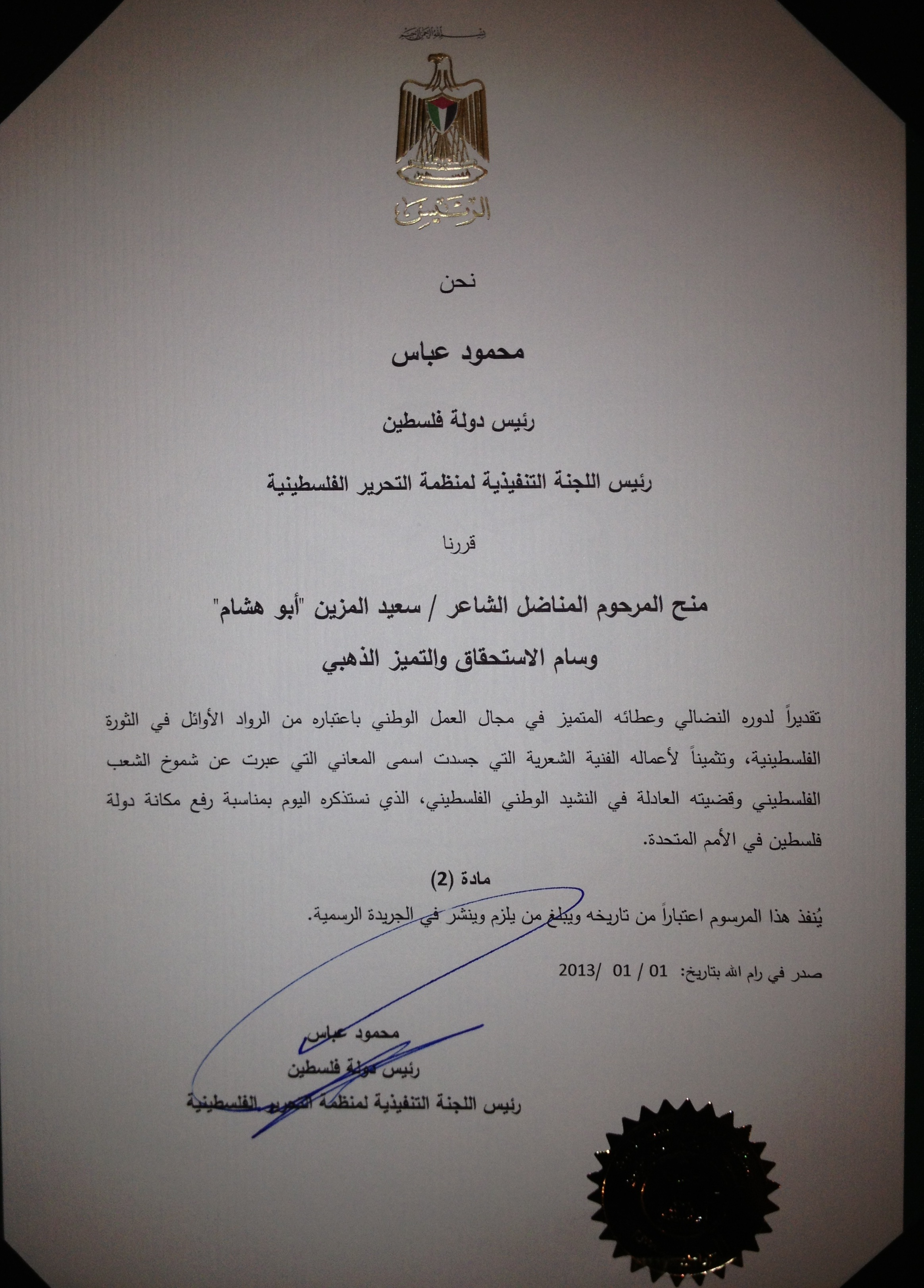 مرسوم رئاسي بمنح المناضل الفلسطيني سعيد المزين وسام الاستحقاق والتميز الذهبي في 01/01/2013